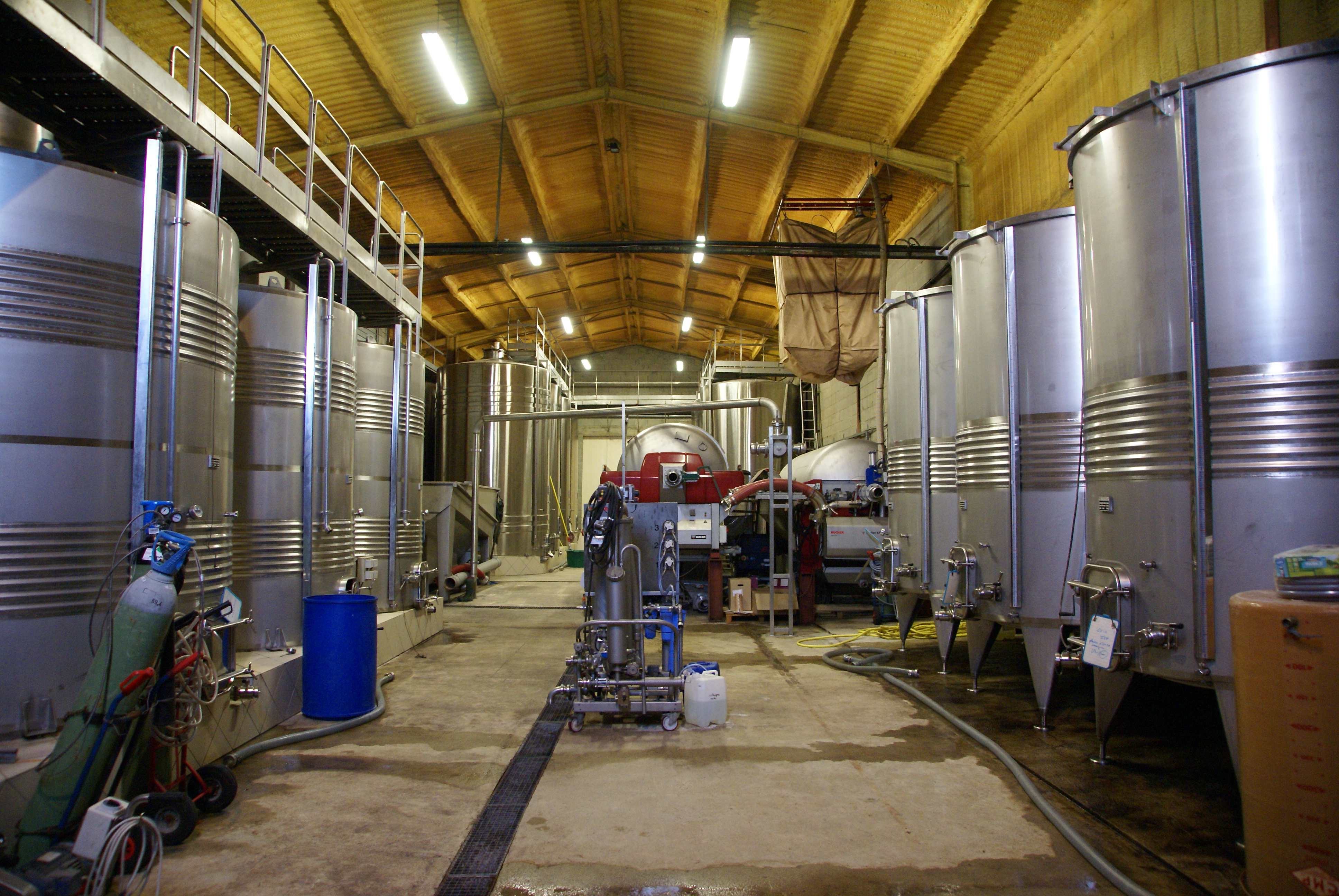 Cuvier à Lanne-Soubiran, servant à la production d'IGP côtes-de-gascogne.